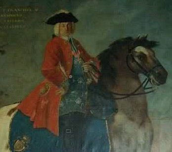 Portrait of Alexander II Ruspoli, prince of Cerveteri